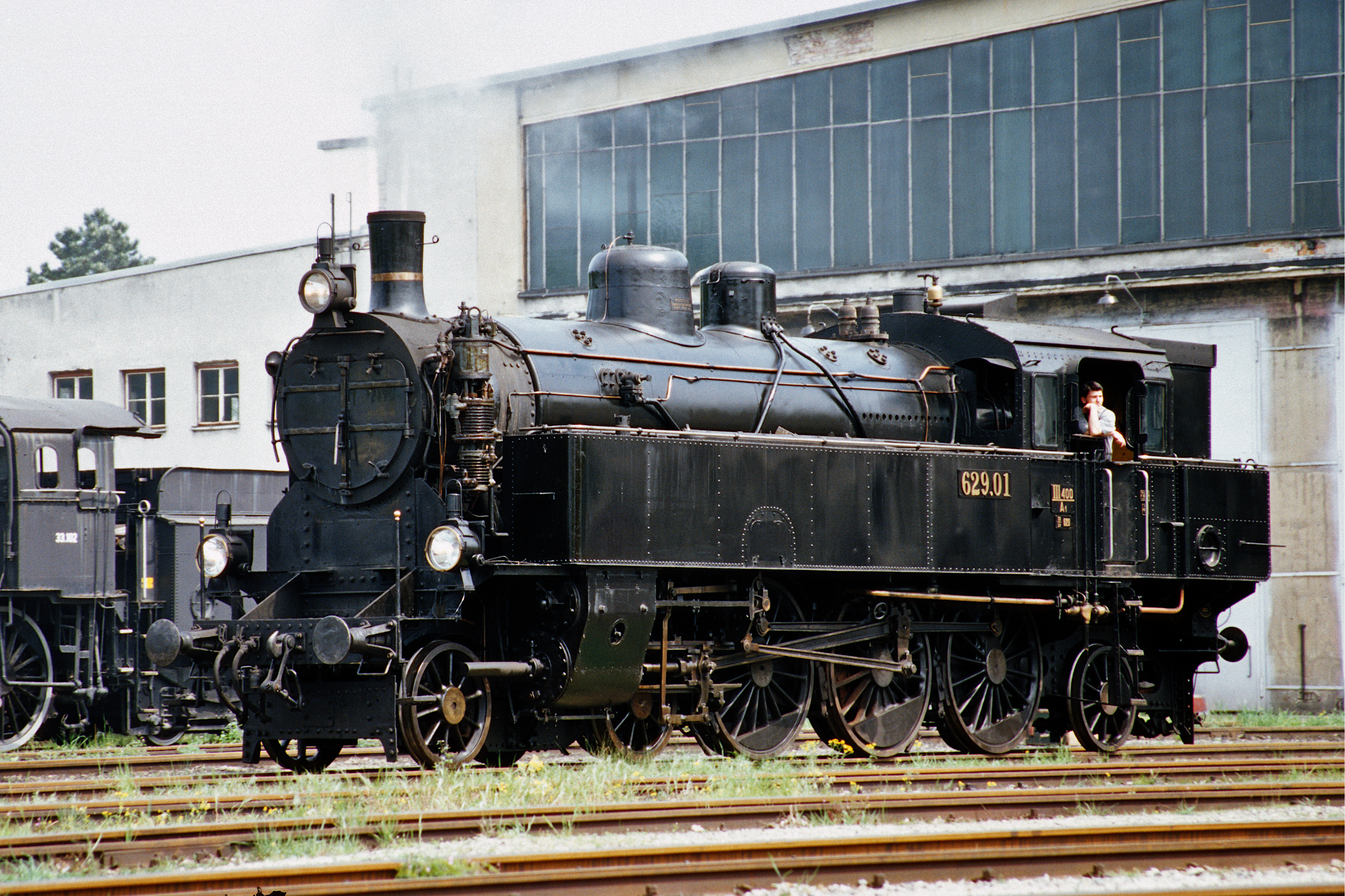 629.01 der Österreichischen Südbahn bzw. 77.66 der ÖBB im Eisenbahnmuseum Strasshof, Niederösterreich